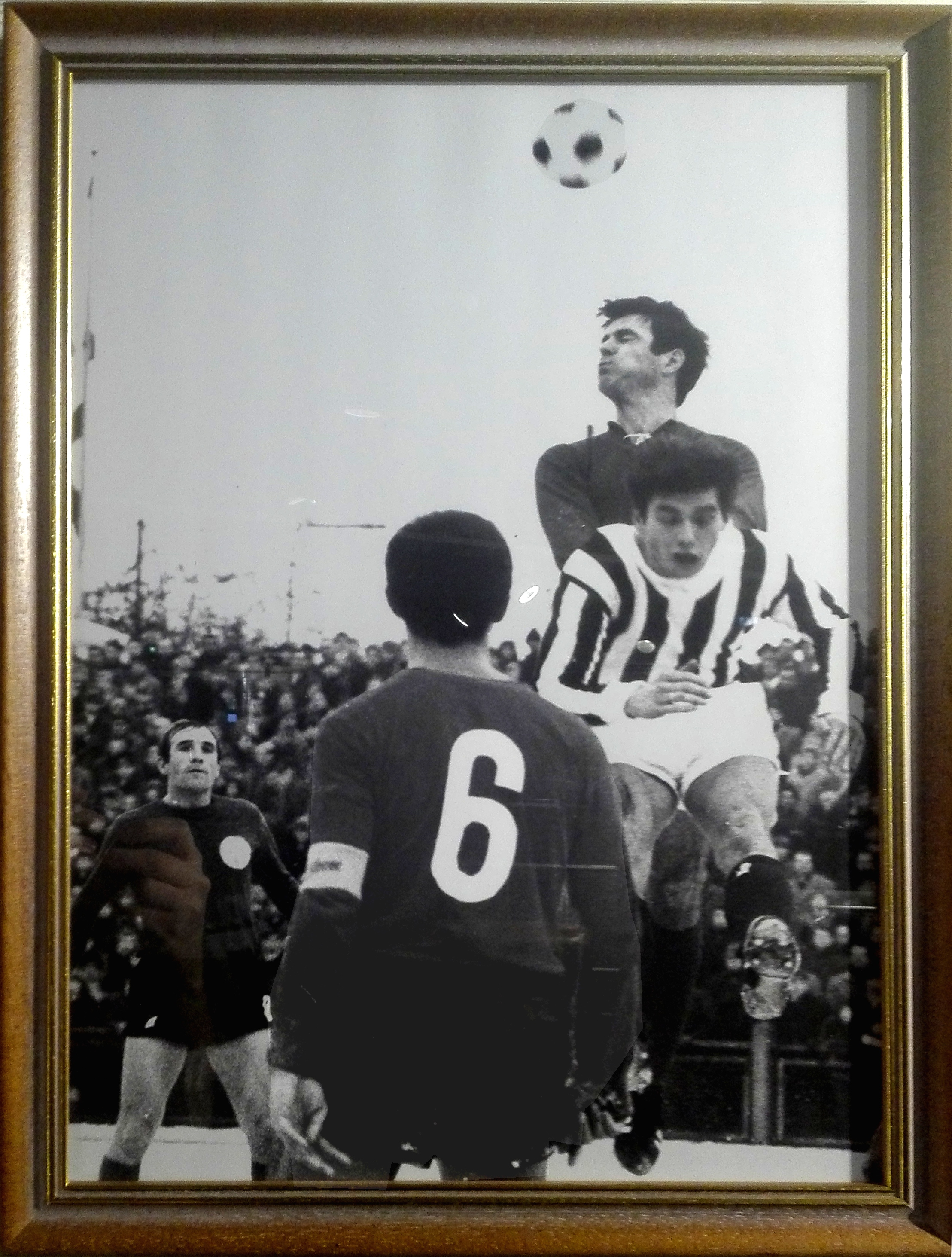 Bilderrahmen mit einem Bild von Leo Wilden als Spieler von Bayer Leverkusen